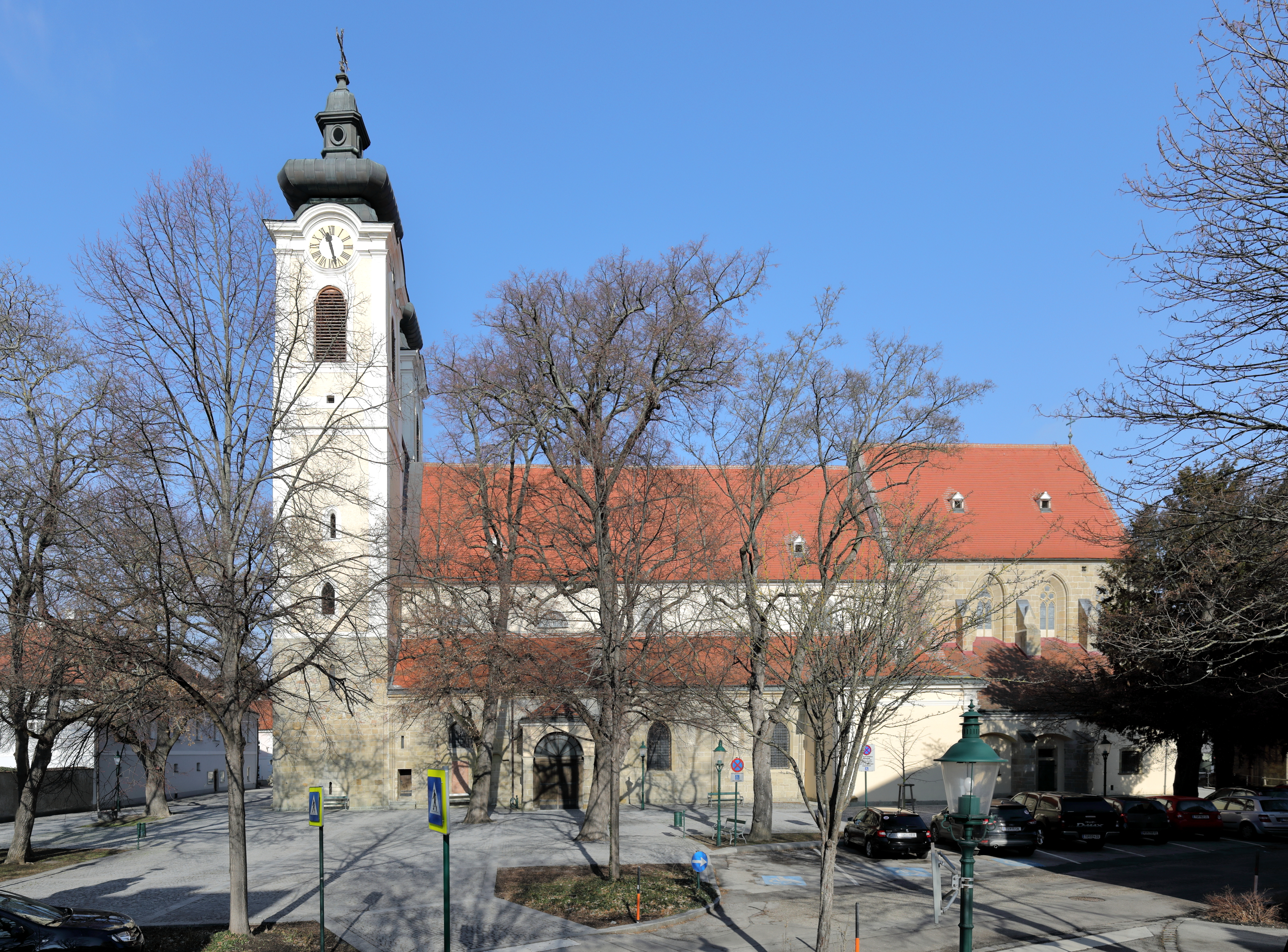 Südansicht der röm.-kath. Stadtpfarrkirche hl. Stephan in der niederösterreichischen Stadtgemeinde Tulln an der Donau.Eine romanisch/gotische Pfeilerbasilika mit monumentaler romanischer Doppelturmfassade. Nach einem Brand 1752 wurden die Türme im barocken Stil erhöht. Der gotische Chor wurde um 1300 errichtet.